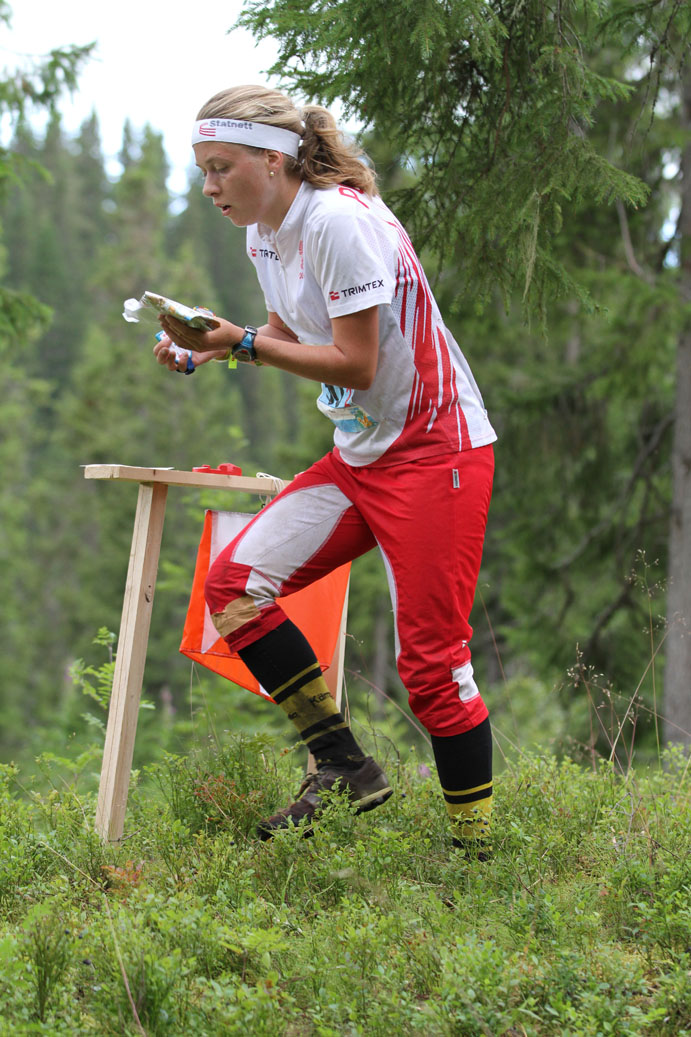 Relay at WOC2010